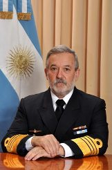 Almirante Daniel Alberto Enrique Martin.